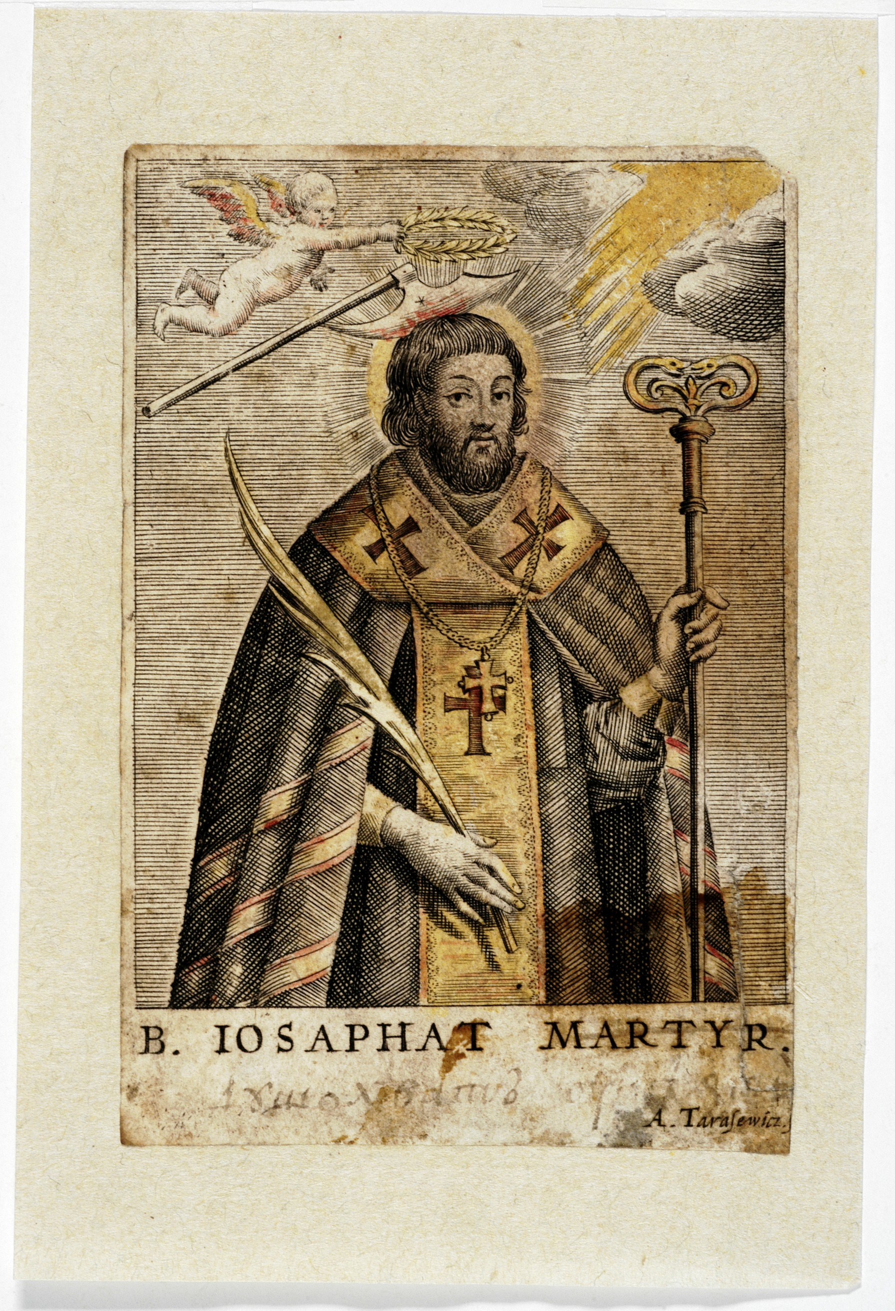 Wizerunek św. Jozafata Kuncewicza, miedzioryt z XVII/XVIII w. autorstwa Aleksandra Tarasowicza